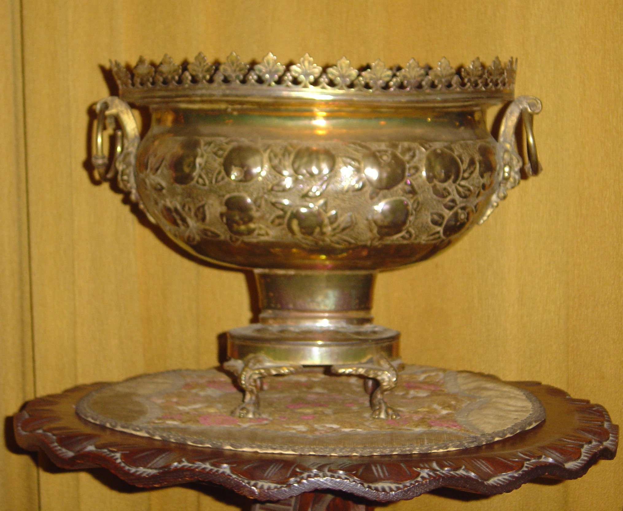 Vasque en dinanderie, vers 1860.